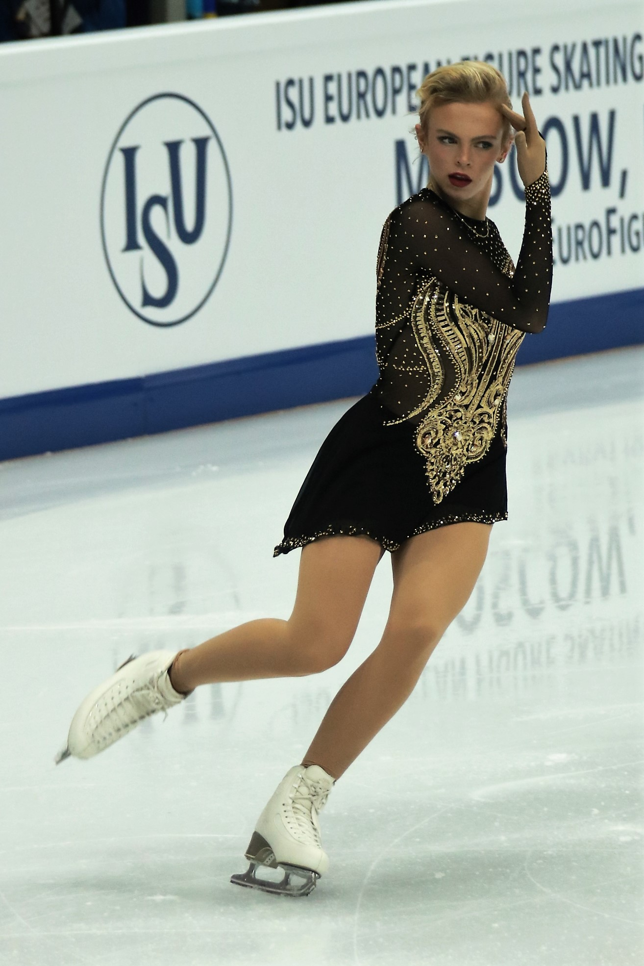 Эмми Пелтонен (Финляндия) на Чемпионате Европы по фигурному катанию 2018.